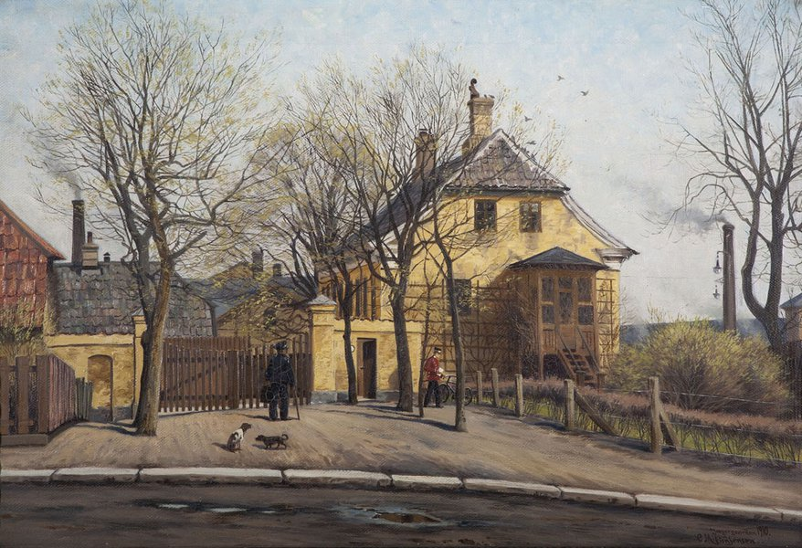 painting